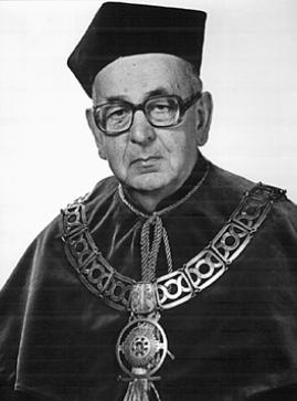 Antoni Marian Plamitzer (1916-2001), pierwszy dziekan Wydziału Elektrycznego WSI w Opolu.